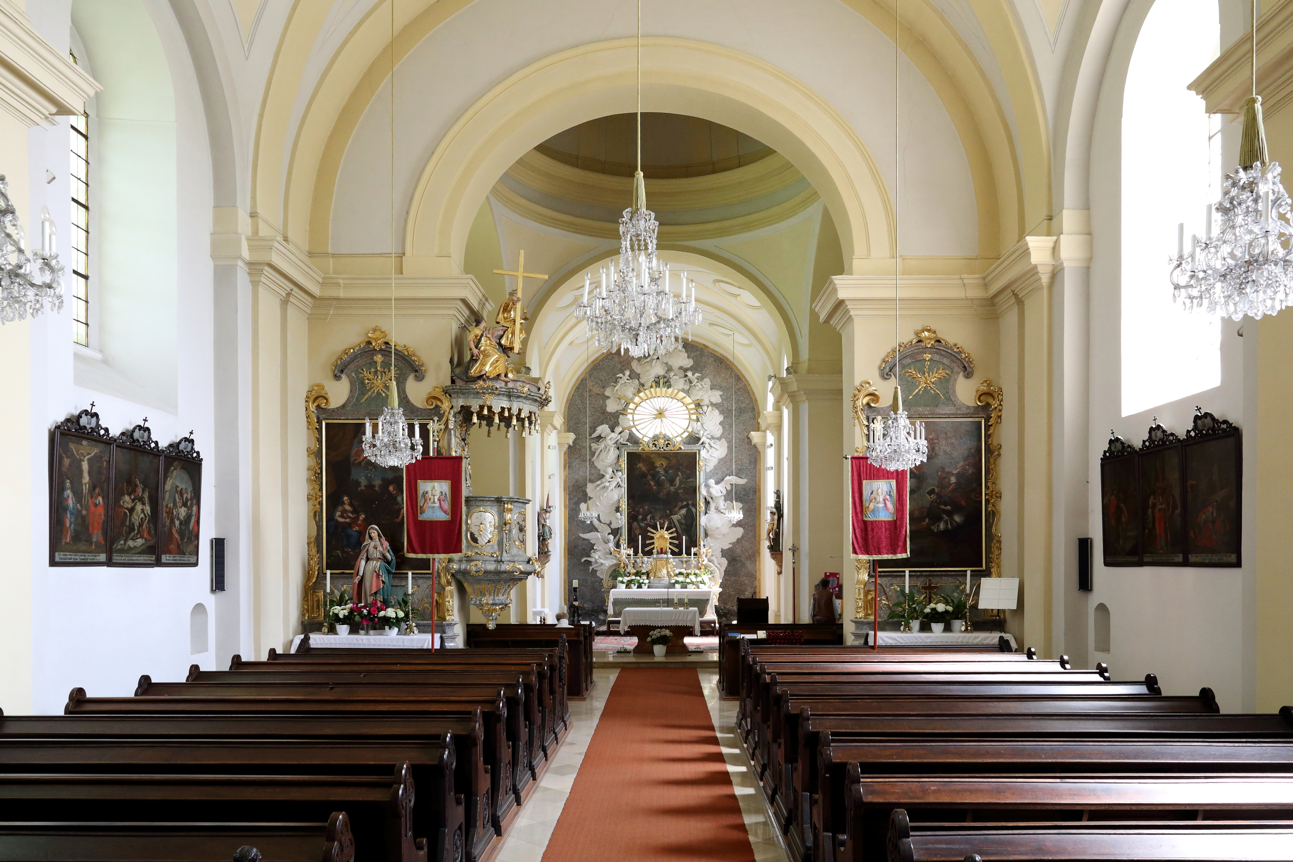 Innenansicht der Pfarrkirche Mariae Himmelfahrt in der niederösterreichischen Marktgemeinde Obersiebenbrunn.Hochaltar, Seitenaltäre und Kanzel stammen aus der Mitte des 18. Jahrhundersts.